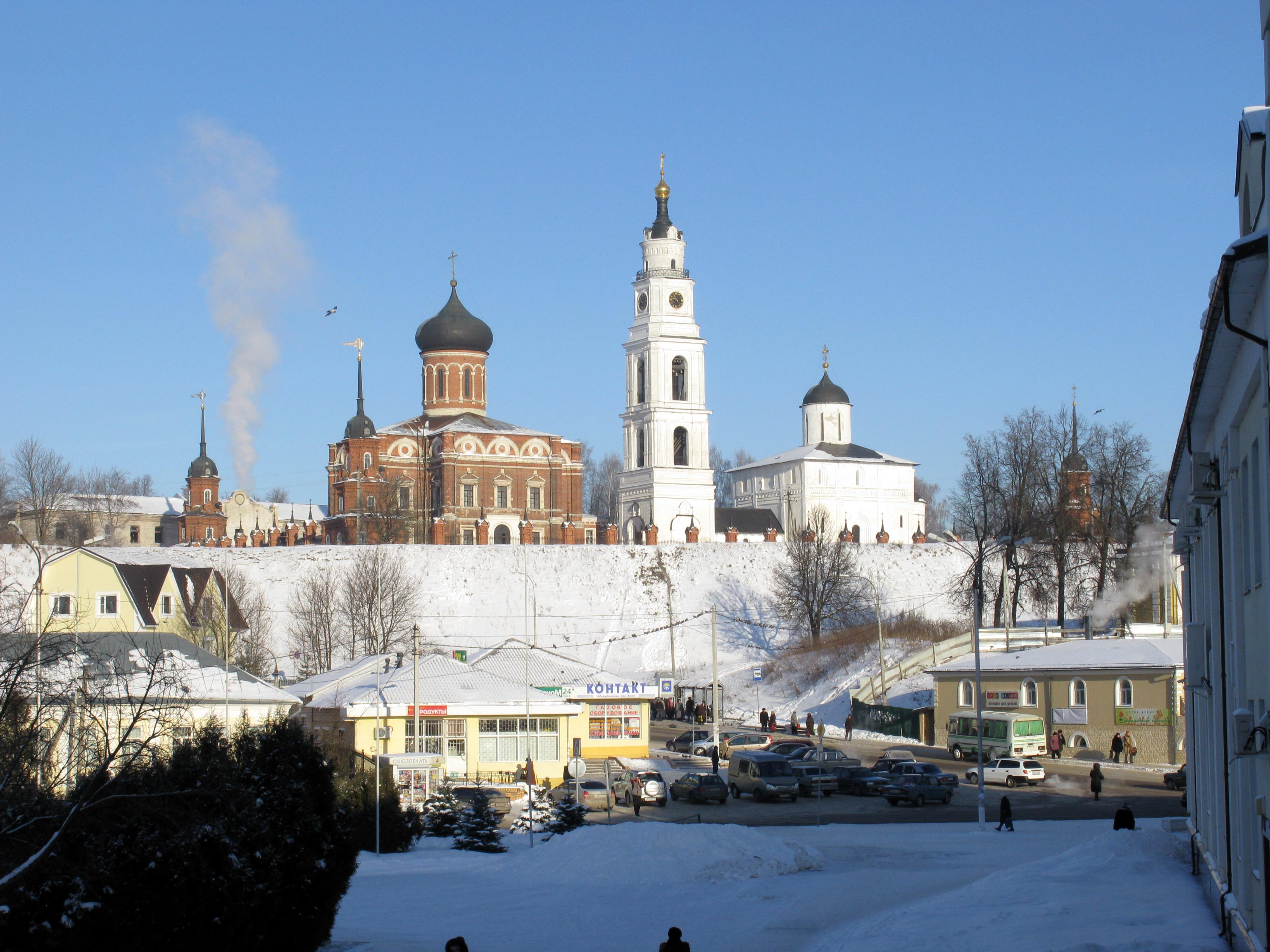 Волоколамск